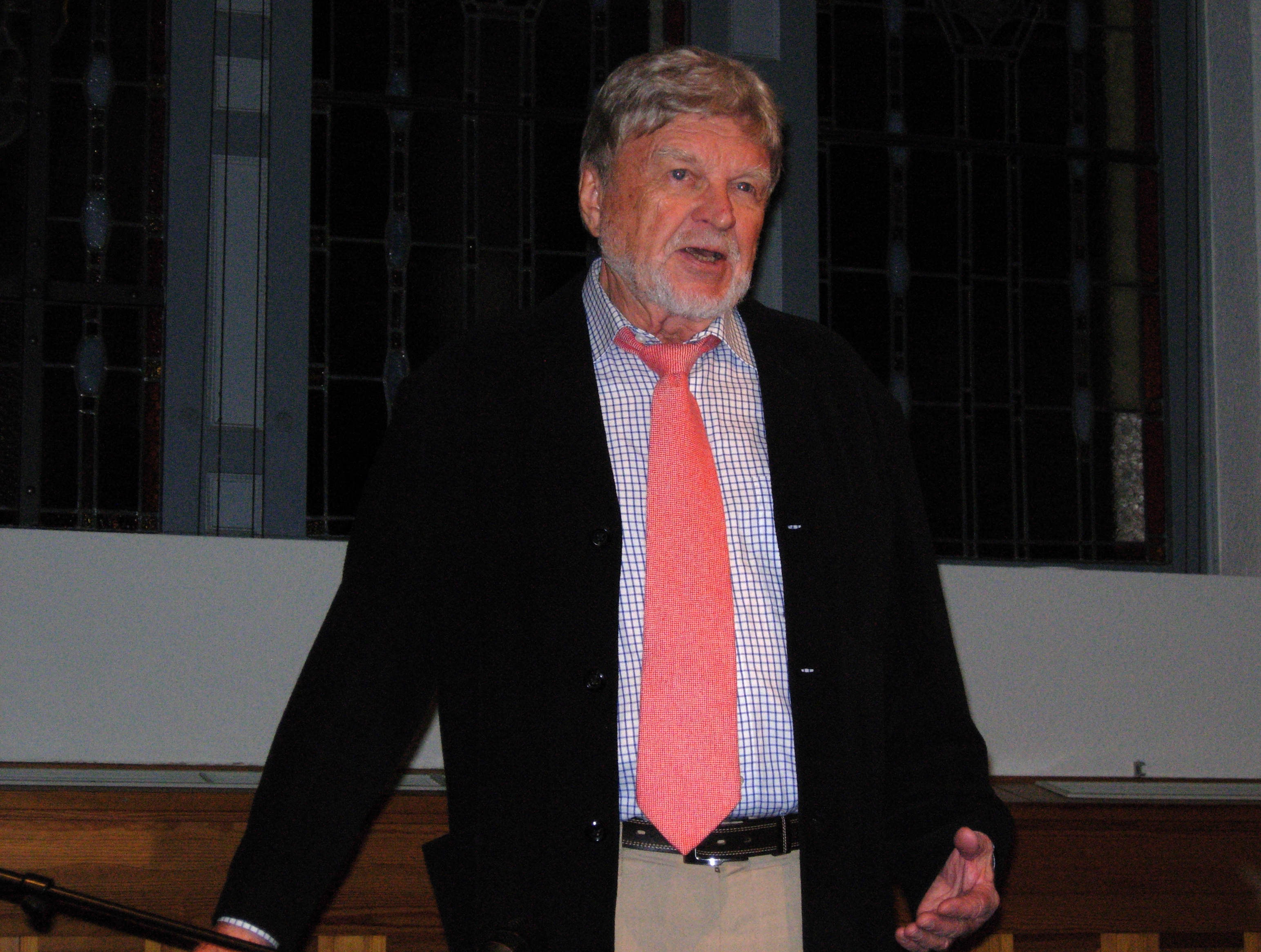 Hardy Krüger 2009 bei einer Lesung aus seinen Büchern in Detmold